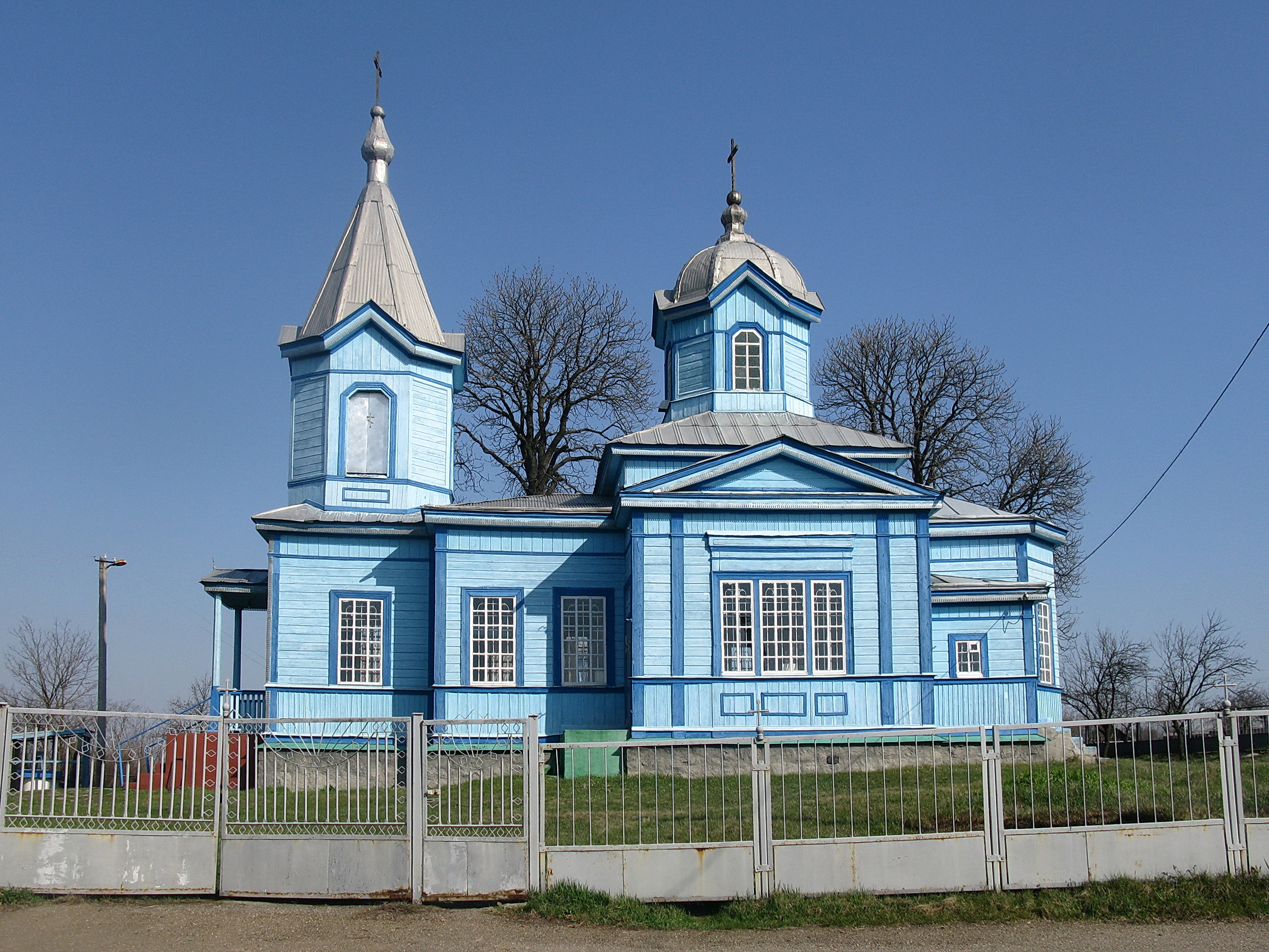 Церква Різдва Богородиці (Богородицька церква) (дер.), с. Ребедайлівка